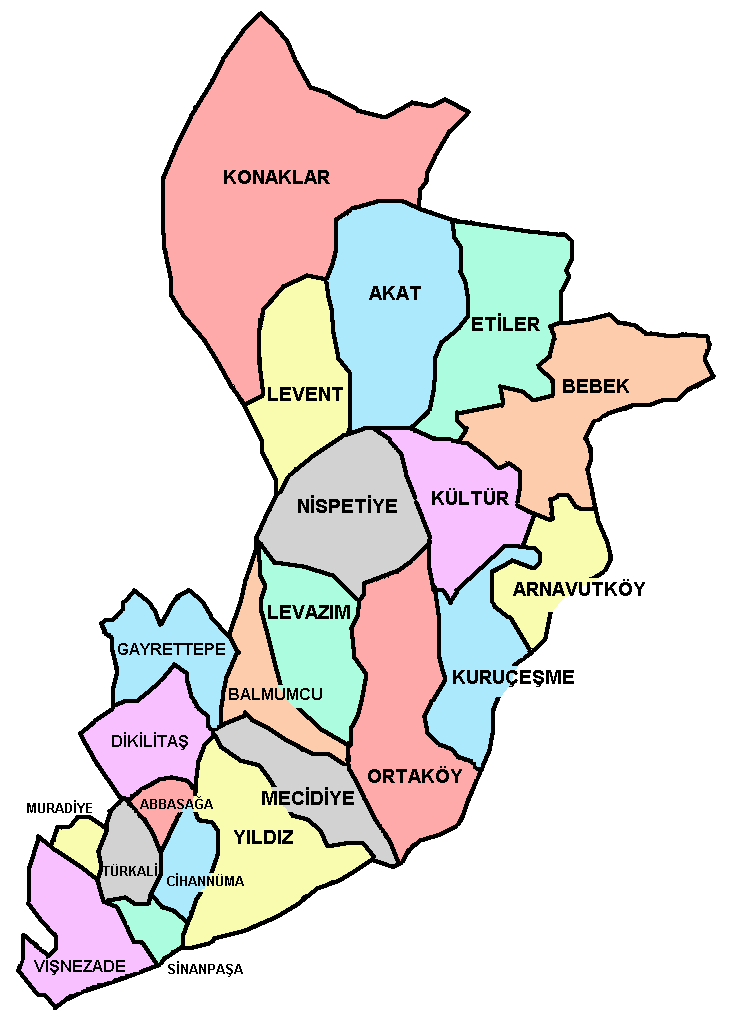 [1] kaynağından yararlandım ama kendim yaptım.